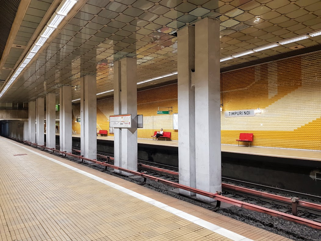 Stația Timpuri Noi, București, iulie 2017.